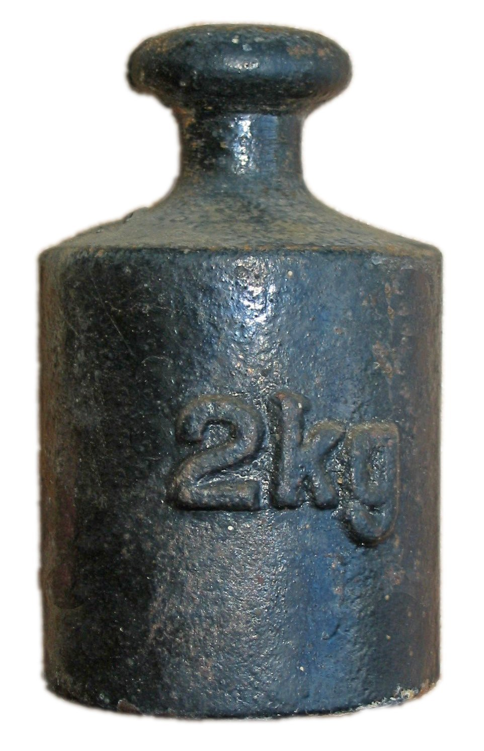 2kg Gewicht